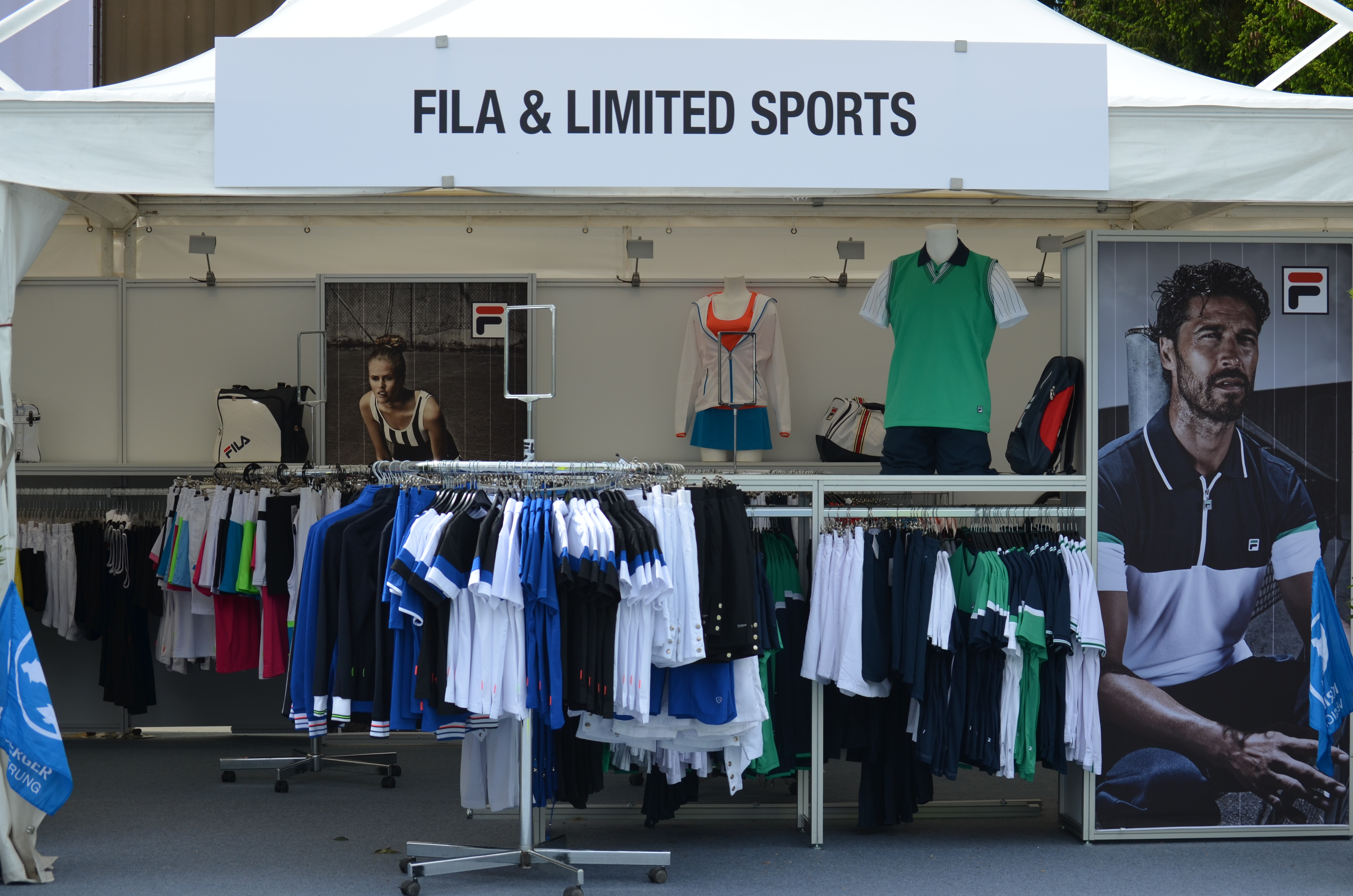 Sponsor Village auf der Anlage des 1.FCN Tennis beim Nürnberger Versicherungscup 2014